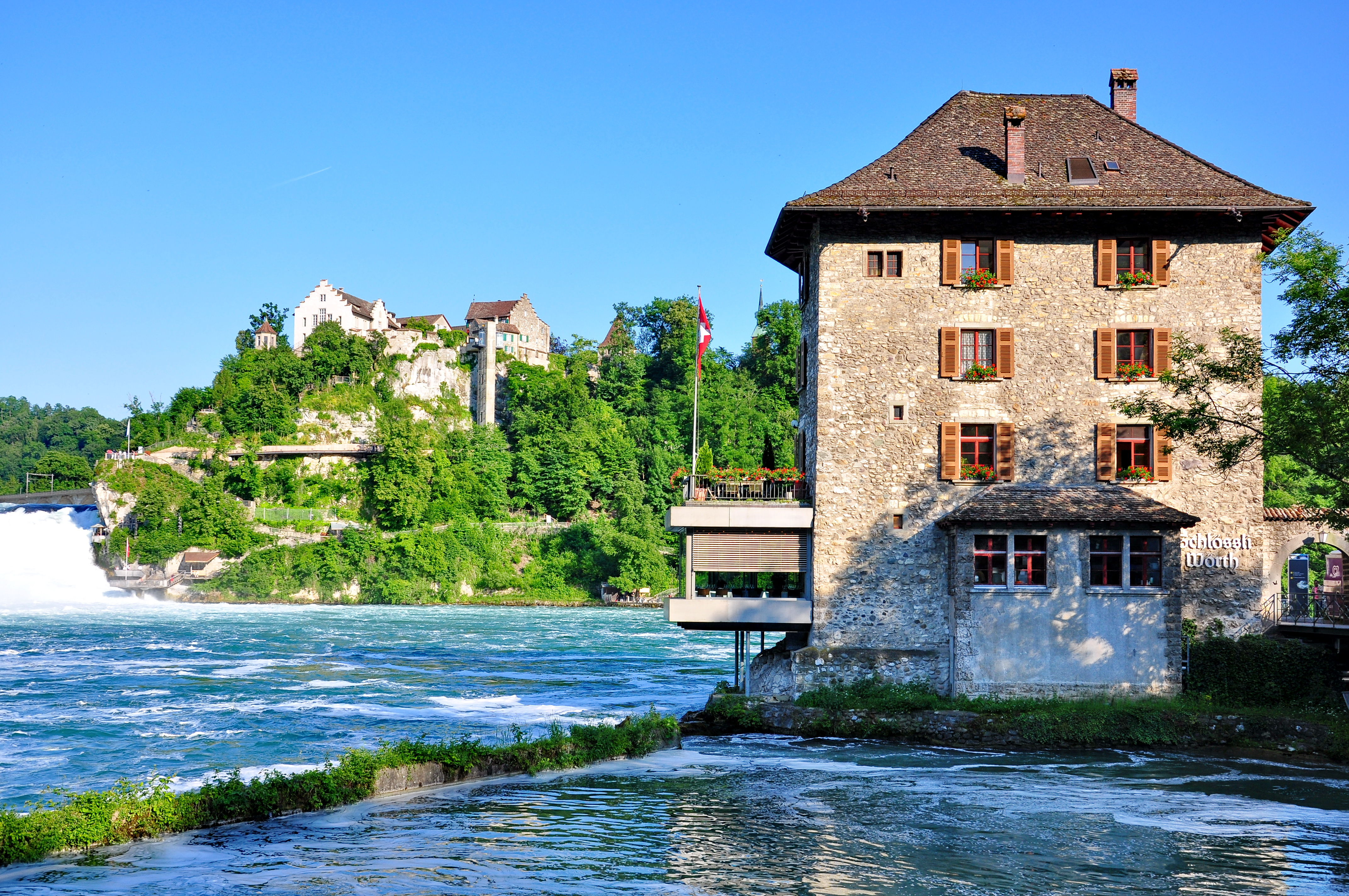 Schlössli Wörth in Neuhausen am Rheinfall (Switzerland), Rheinfall and Schloss Laufen in the background.